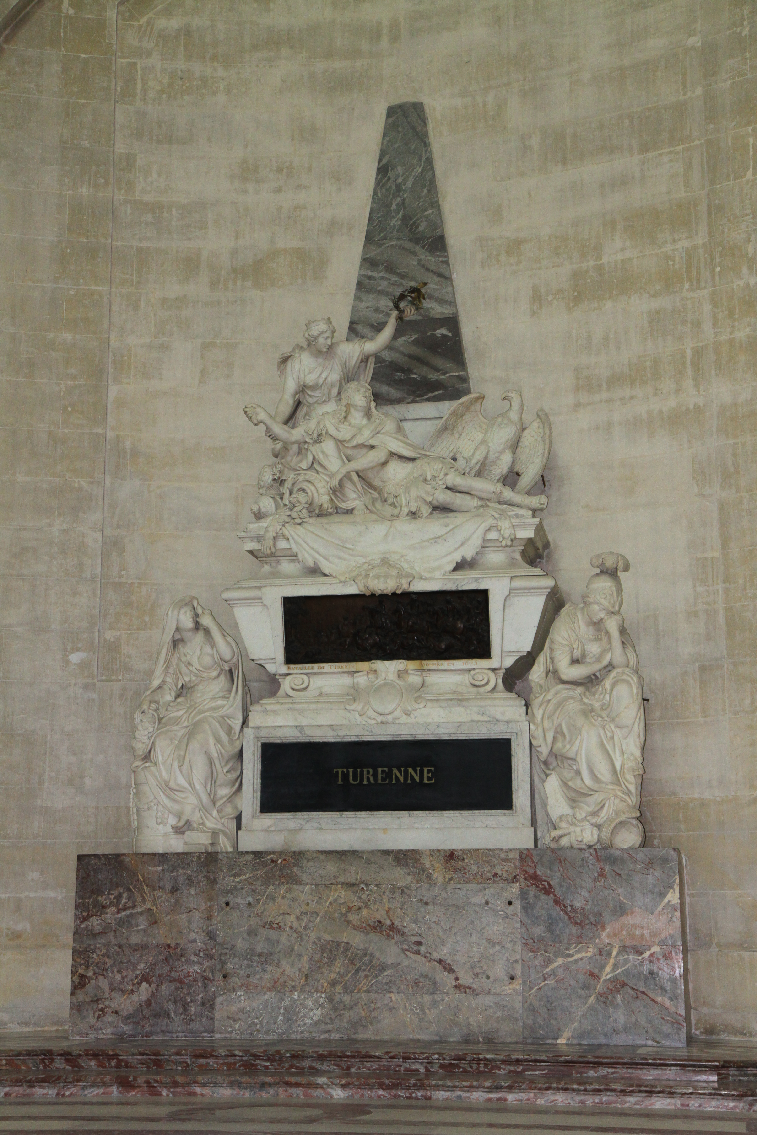 Le tombeau de Turenne aux Invalides. .